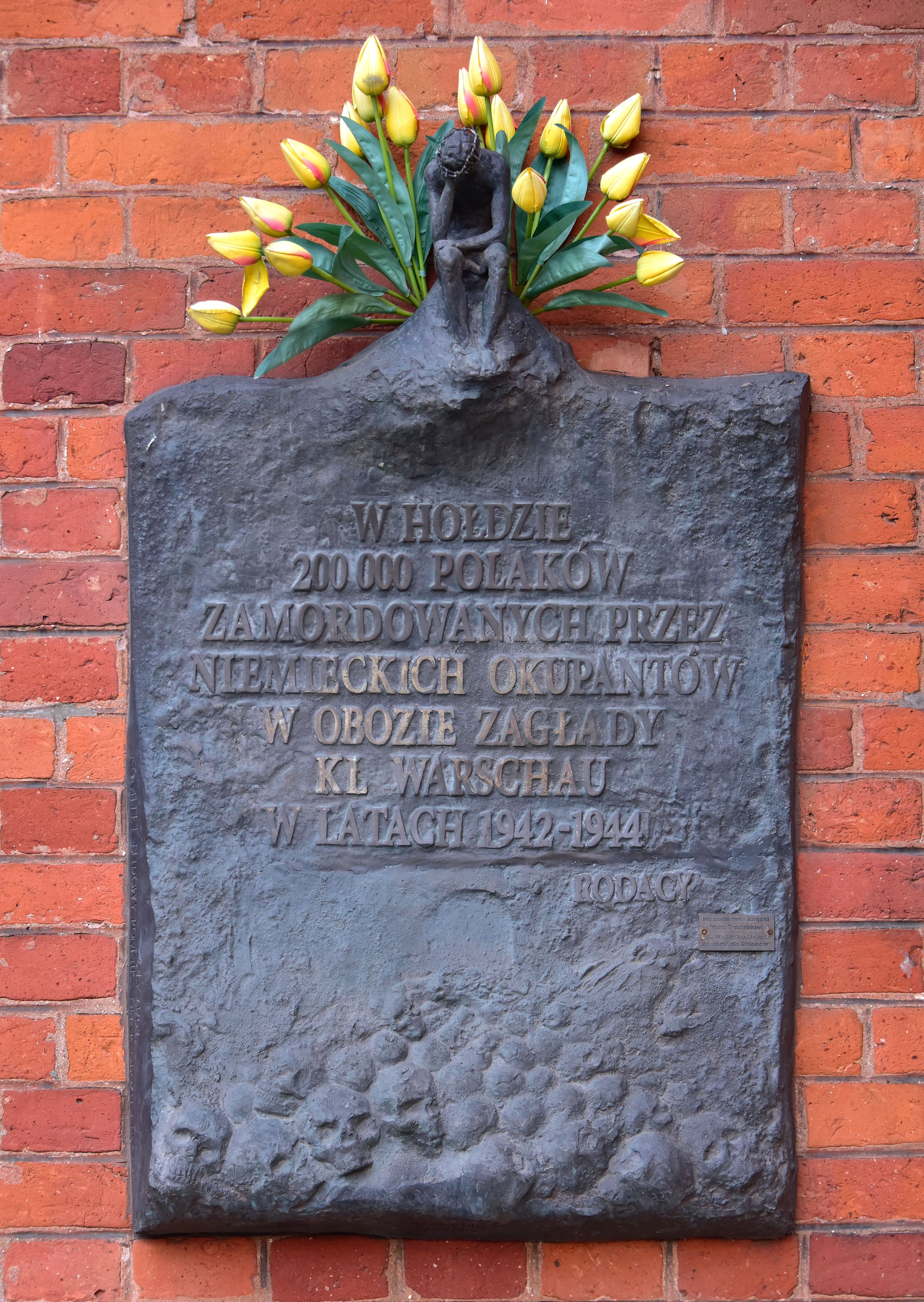 Tablica upamiętniająca KL Warschau przy wejściu do kościoła św. Stanisława Biskupa i Męczennika przy ul. Bema w Warszawie